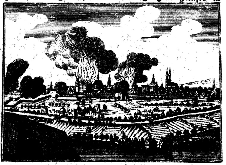 Abbildung aus: Des neueröffneten Historischen Bilder-Saals Dreyzehenter Theil. In welchem die allgemeine Welt-Geschichte vom Jahr 1756 biß 1760, unter Kaiser Franz I., besonders der durch Europa sich ausgebreitete Krieg mit vielem Fleiß, aufrichtig und unpartheyisch beschrieben, und die vornehmsten Begebenheiten in anmuthigen Kupfern vorgestellet sind, Nürnberg [1762], S. 612.